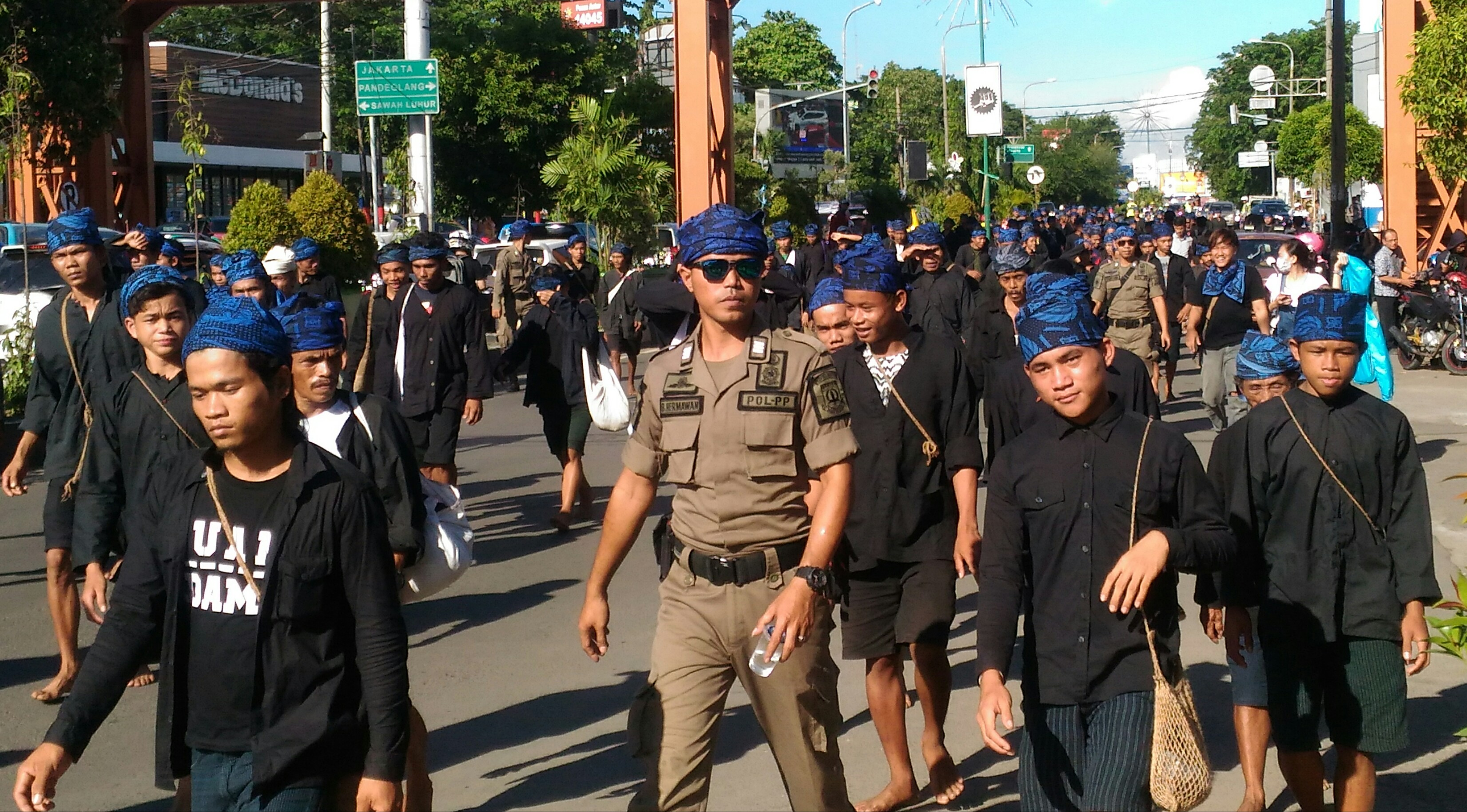 Acara adat Seba Baduy dilakukan setiap tahunnya oleh Masyarakat Urang Kanekes di Perkampungan Baduy Ciboleger, Lebak, Banten. Setelah masa panen hasil bumi, lebih dari Seribu orang Suku Baduy melakukan prosesi Seba Baduy dengan berjalan kaki tanpa alas kaki dan kendaraan bermotor dari Perkampungan Suku Baduy di Ciboleger, Lebak menuju Ibukota Provinsi Banten Kota Serang untuk menemui Bapak Gede (Gubernur Banten) sebagai ajang silaturahmi, penyerahan hasil bumi, dan penyampaian pesan adat Masyarakat Urang Kanekes (Suku Baduy Banten) kepada Pemerintah Provinsi Banten.